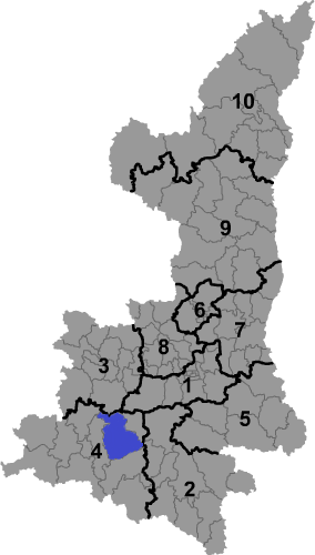 洋縣在陝西省諸縣市之位置